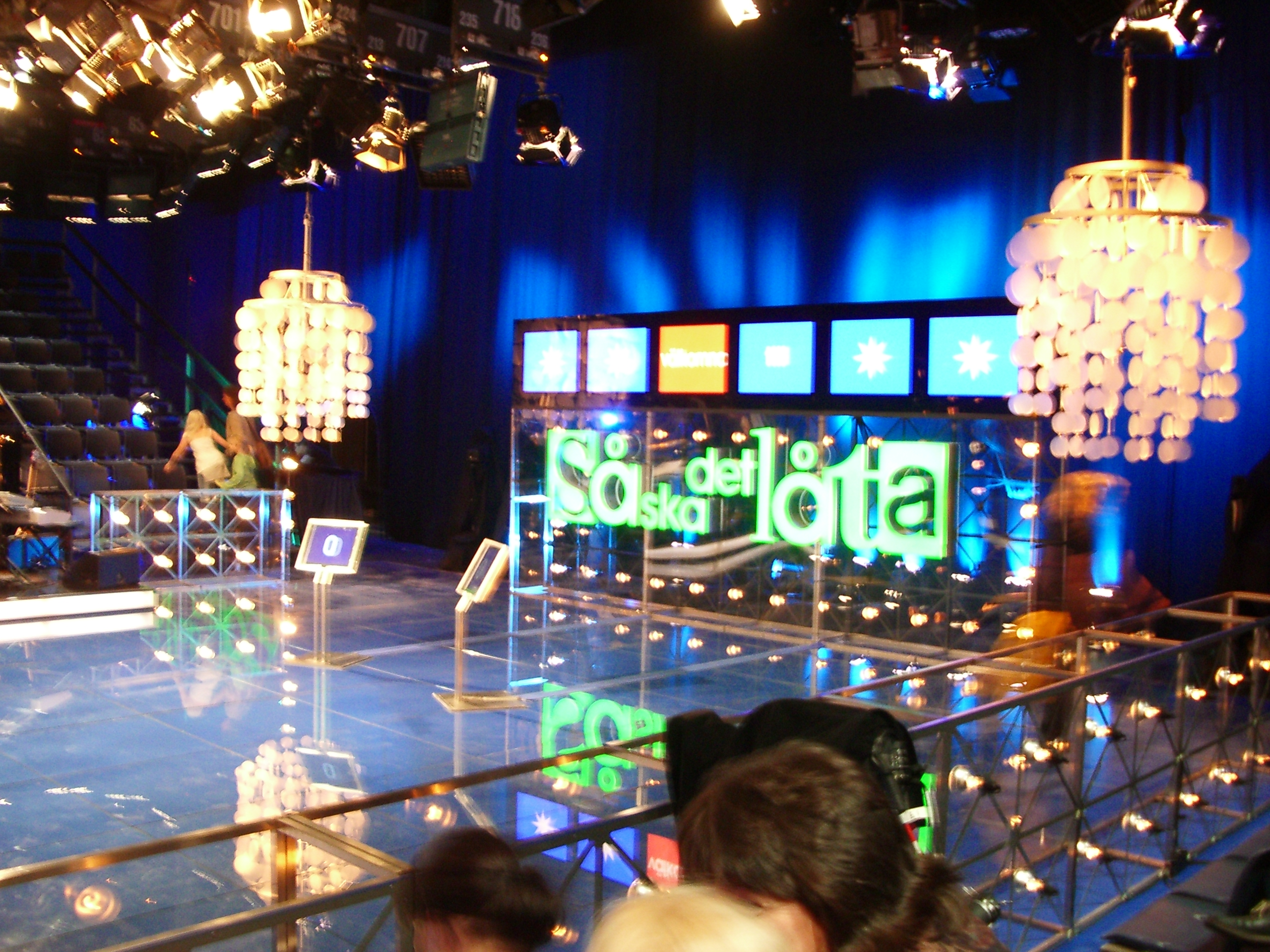 Bild ifrån Så Ska Det Låta studion i Stockholm